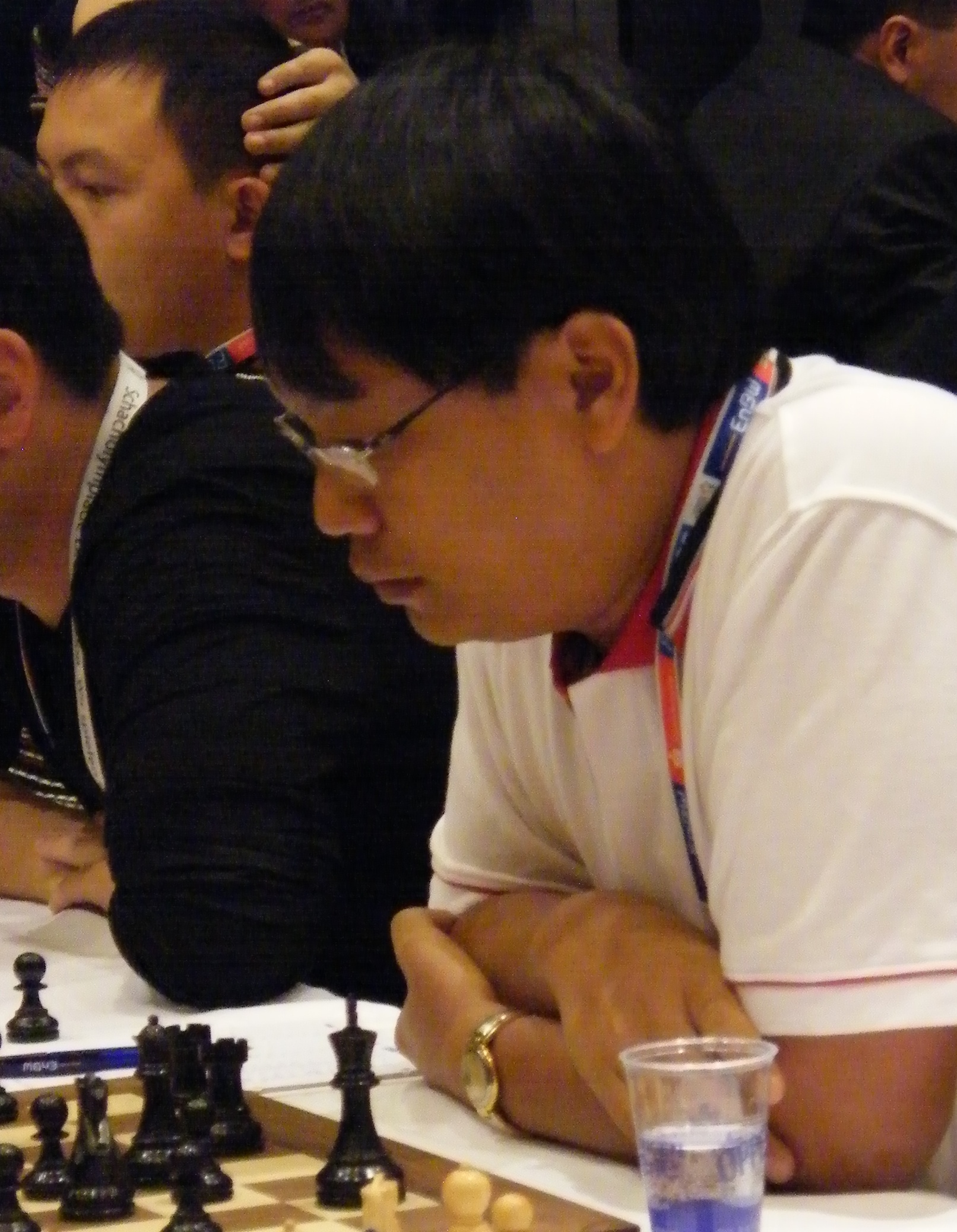 Jirapak Pitirotjirathon bei der 38. Schacholympiade in Dresden 2008